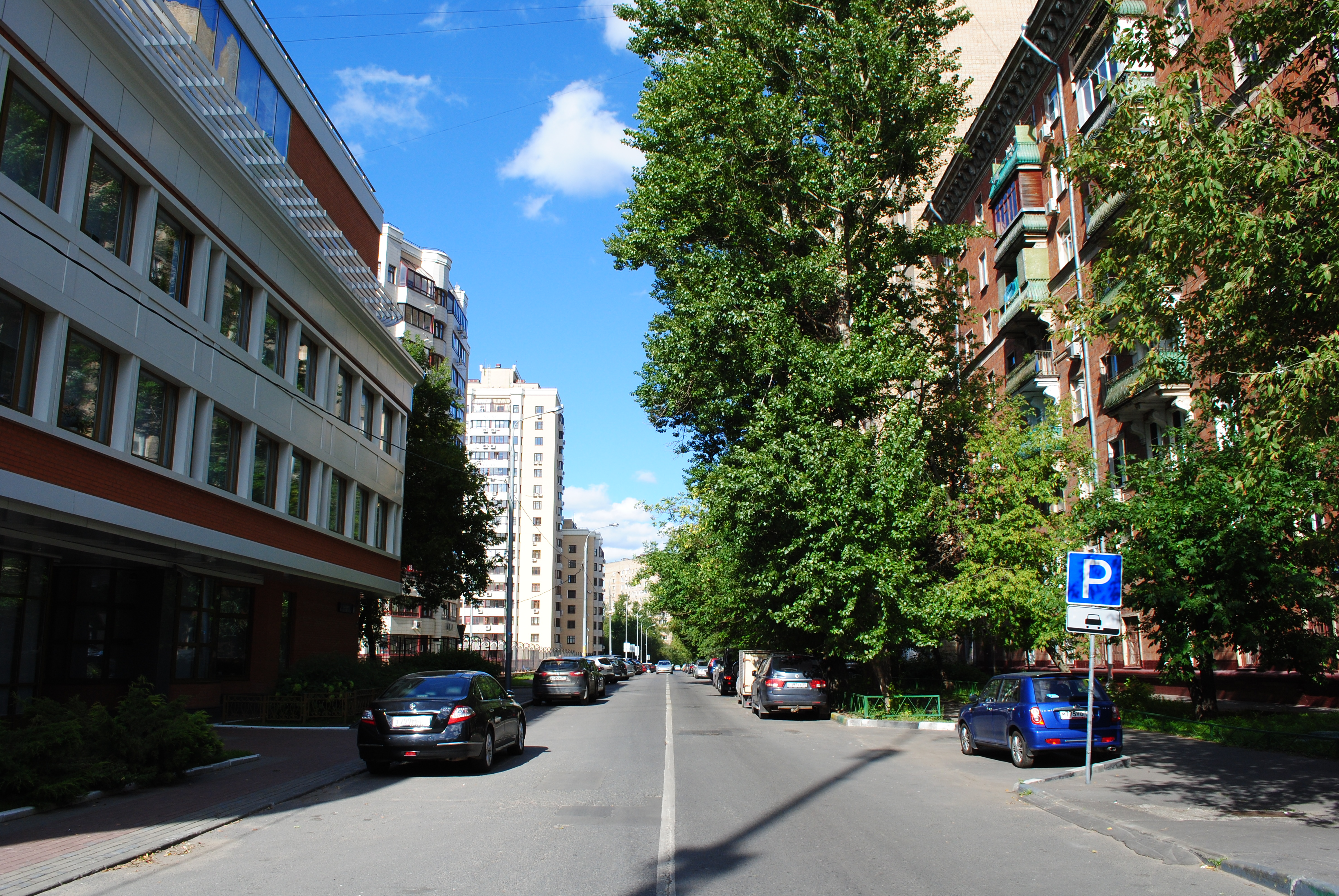 Улица Пудовкина (вид от поворота в сторону улицы Пырьева)